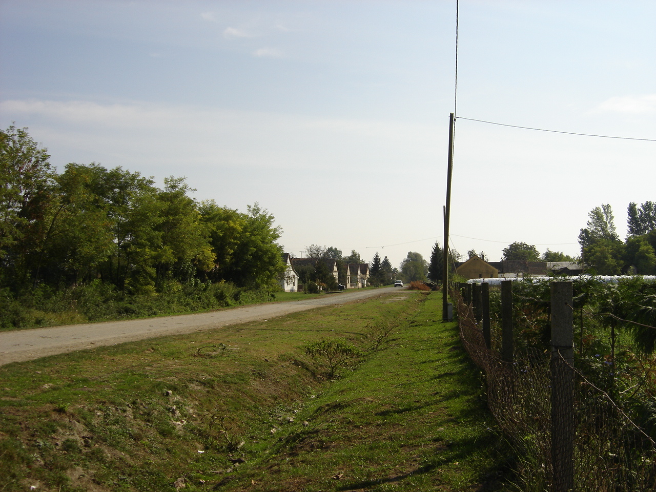 Majške Međe, Ulica Jovana Lazića